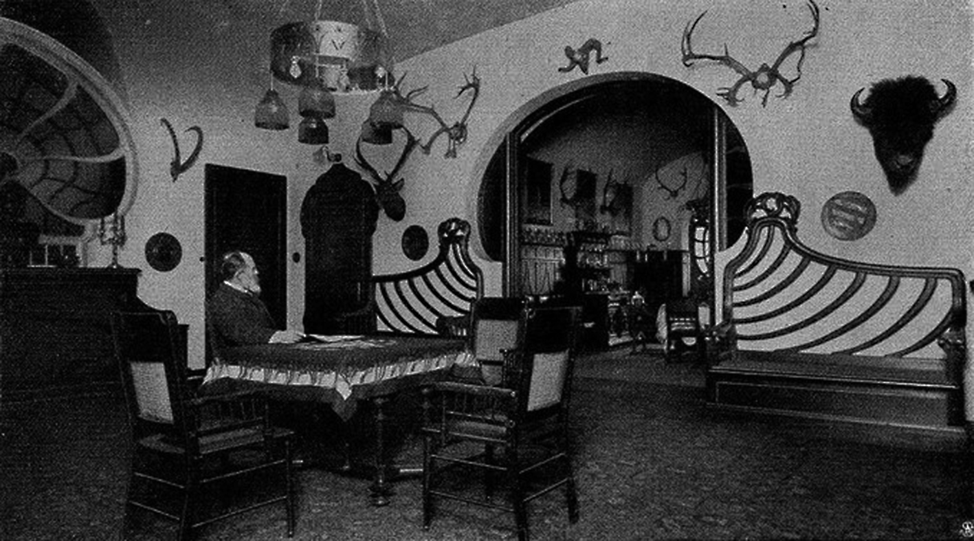 Zeitschriftartikel: "Wie Künstler wohnen. Eugen Bracht Dresden". Gezeigt wird die zweigeschossige Mietwohnung in der Bracht lebte